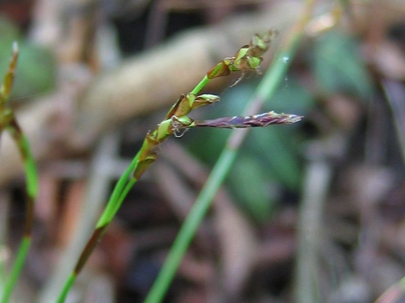 Männliche und weibliche Ähre der Finger-Segge Carex digitata, Rügen